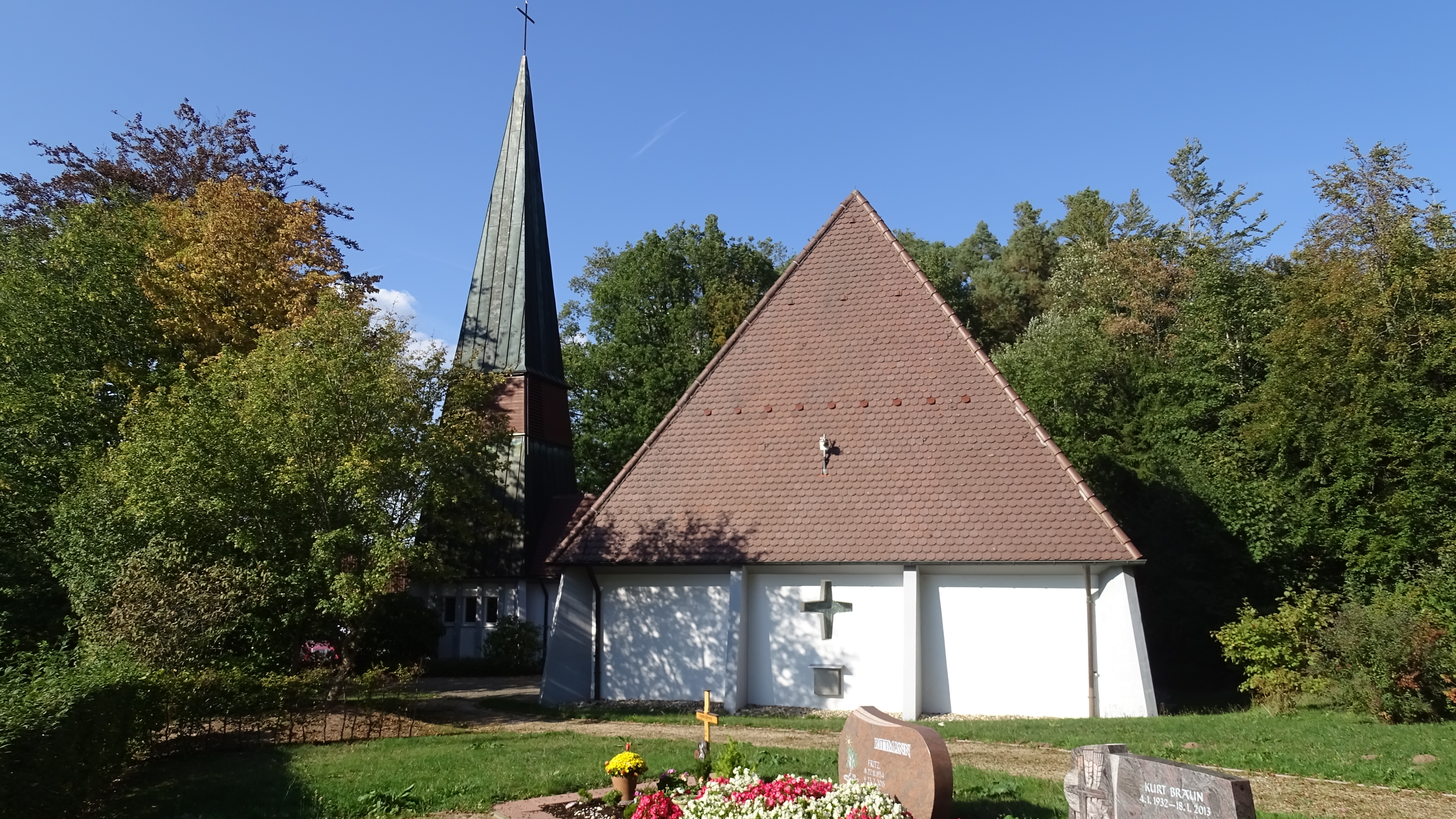 Friedhof und Kirche Sommenhardt, Bad Teinach-Zavelstein.